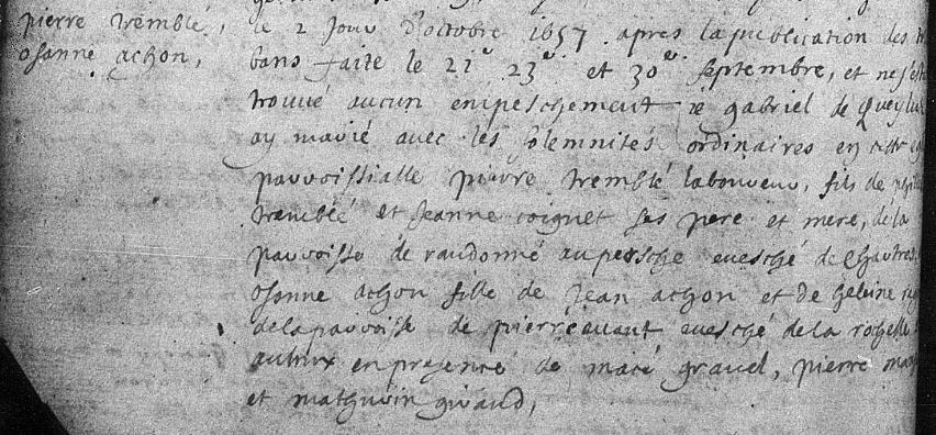 Acte de mariage de Pierre Tremblay et d'Ozanne Achon le 2 octobre 1657 à Québec L'acte de mariage se trouve dans le registre paroissial de la paroisse Notre-Dame de Québec.